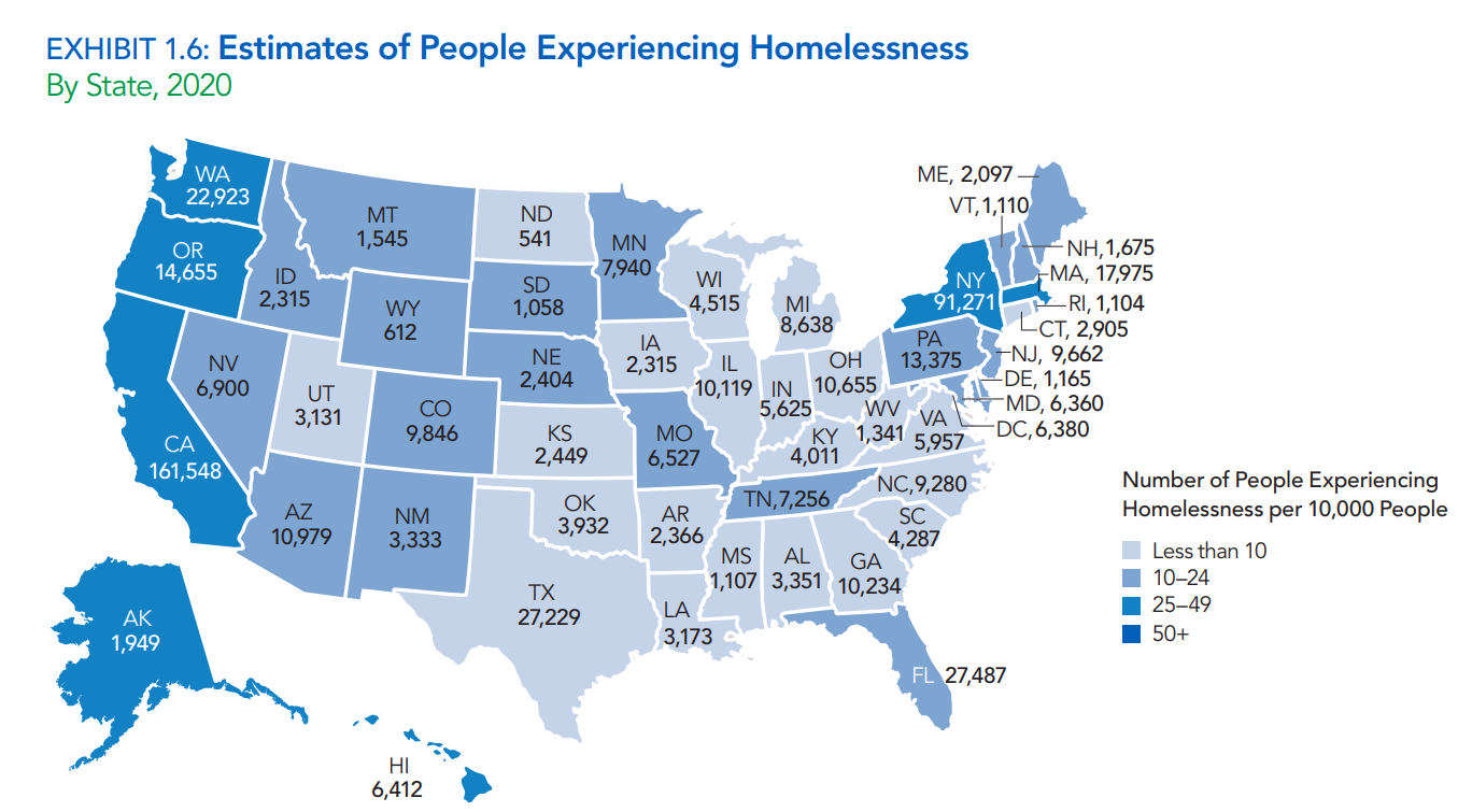 アメリカの州別ホームレス数